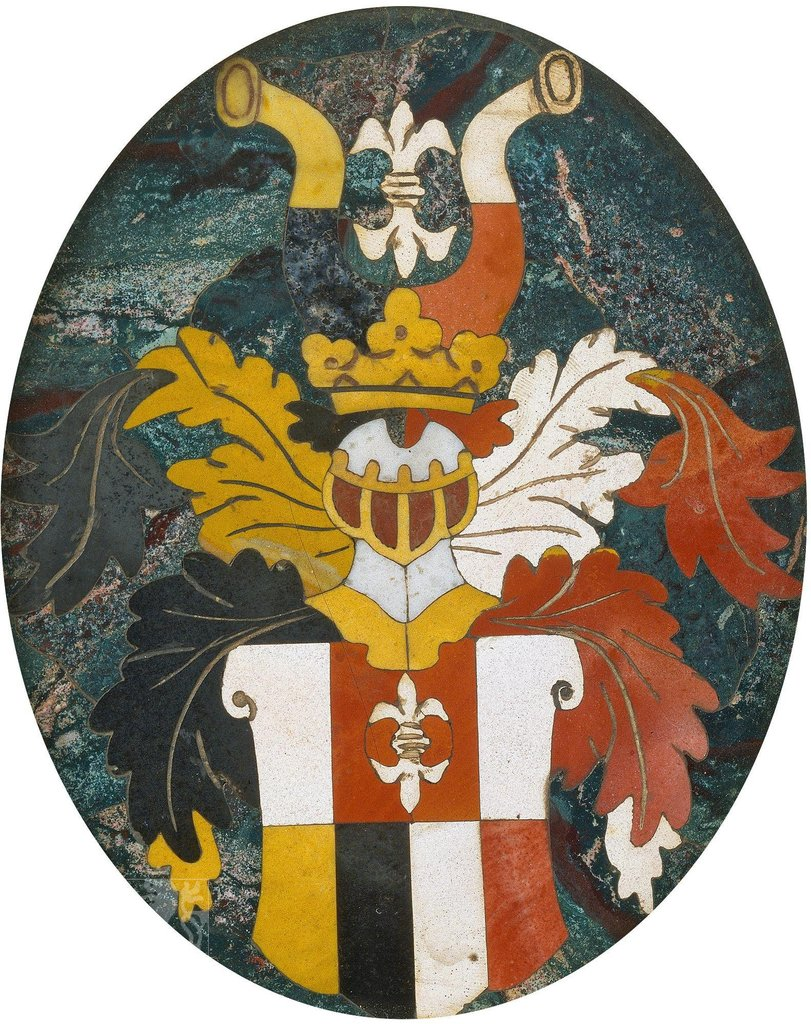 Rodový znak Šotnovských ze Závořic, umělý mramor, ovál 9,4 × 7,6 cm. Umístění: Národní galerie v Praze Podrobný popis